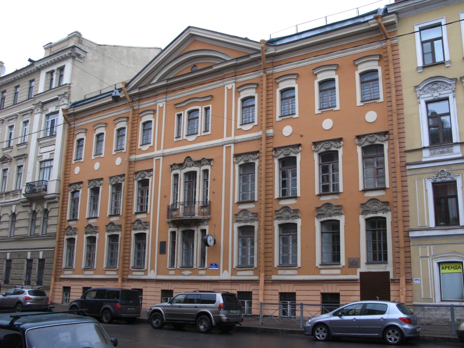 Миллионная ул., д.14. Фасад